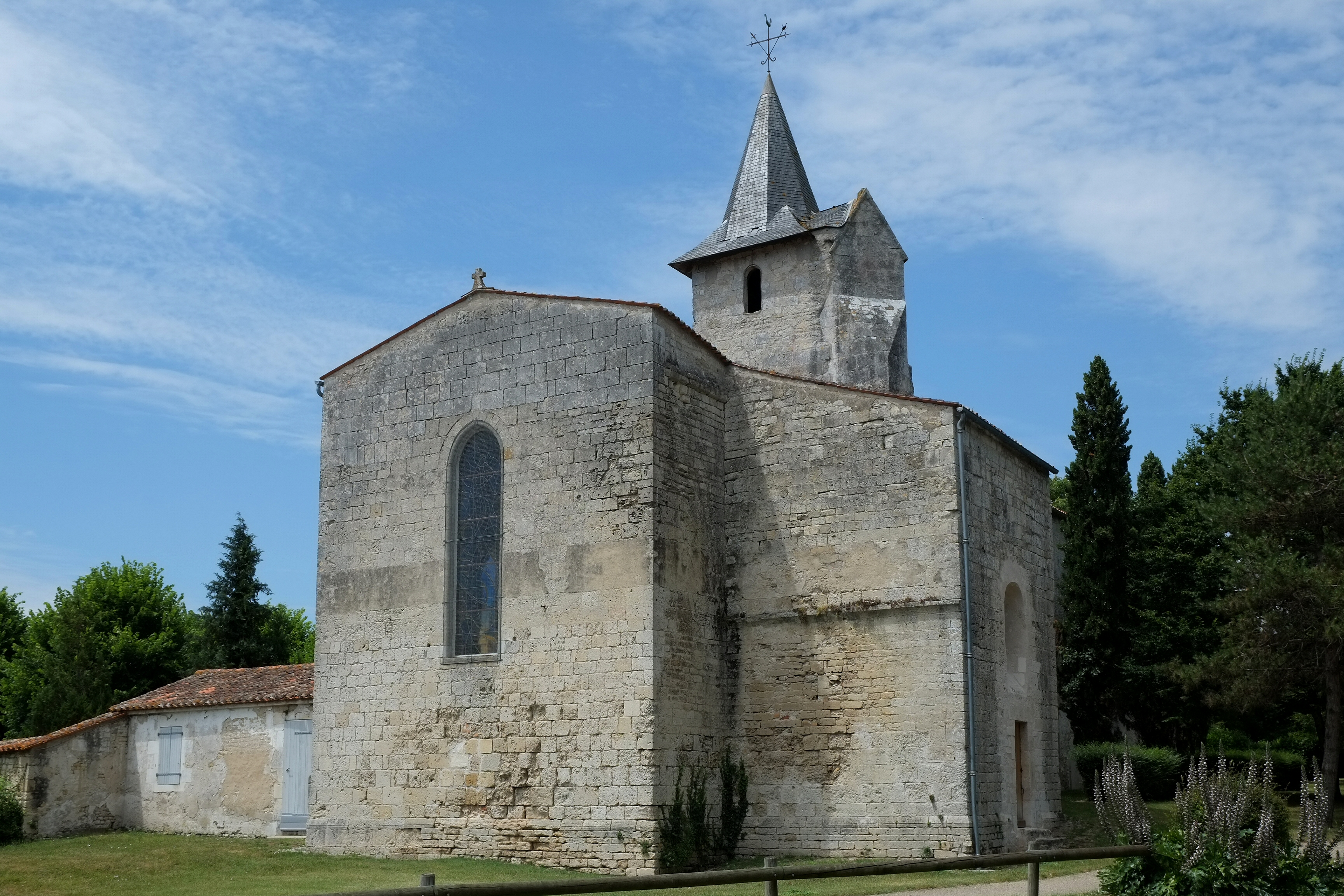 Église Notre-Dame-de-l'Assomption Salles-sur-Mer Charente-Maritime France